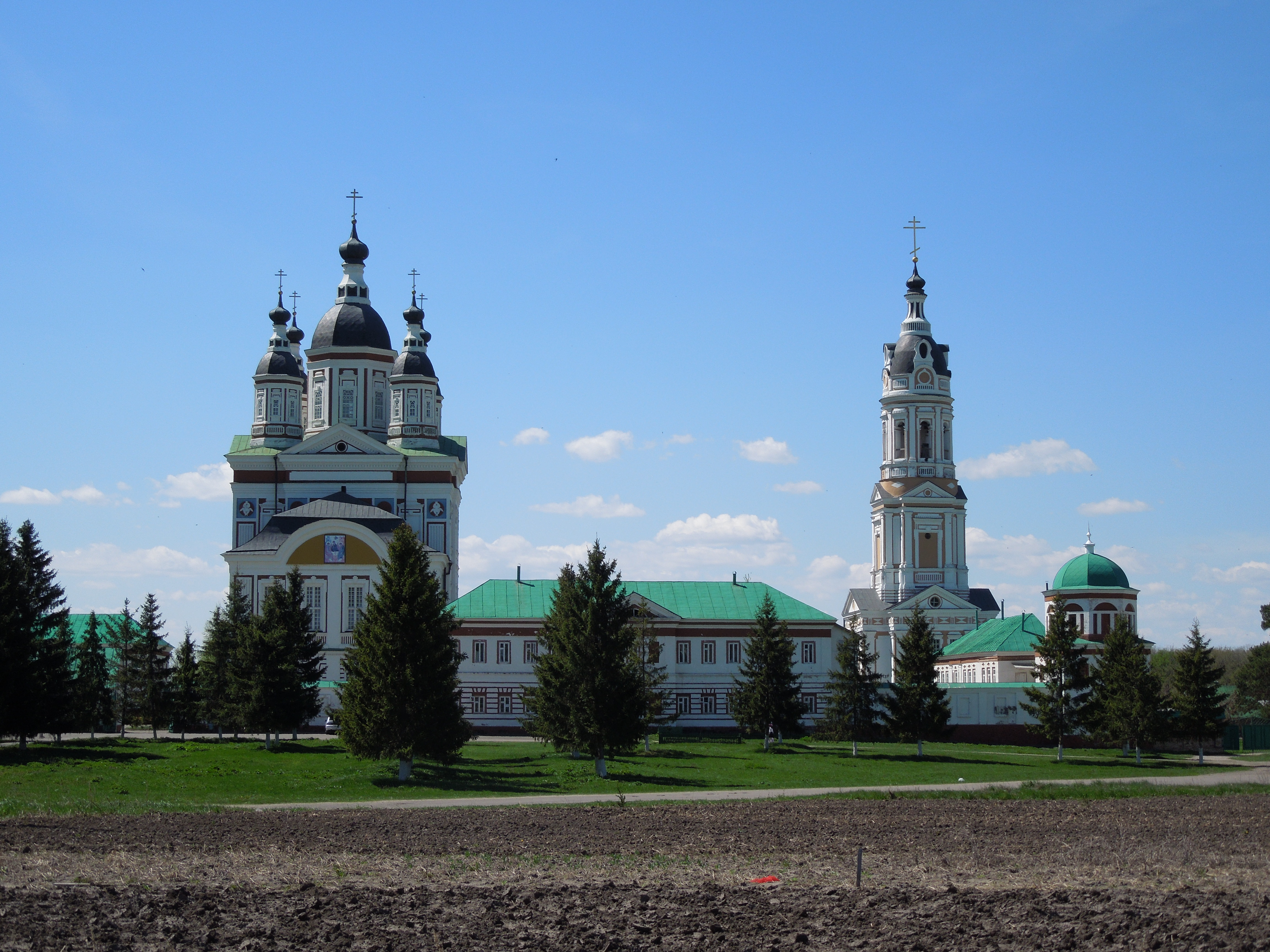 Монастырь Троицкий Сканов: 3 км северо-восточнее села, Наровчат, Наровчатский район, Пензенская область